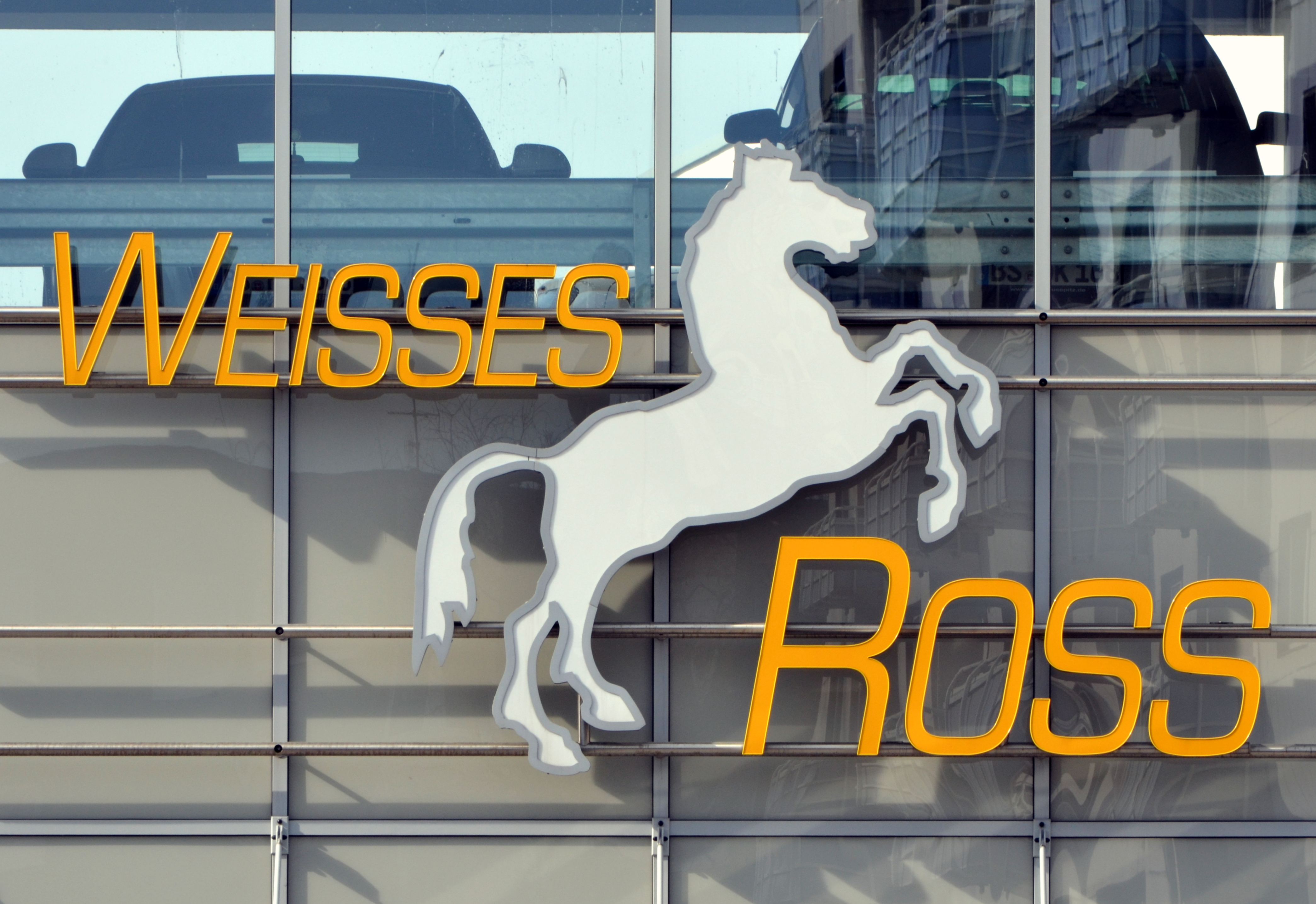 Braunschweig, Celler Straße, Ecke Neustadtring: Logo des Einkaufszentrums „Weisses Ross“.